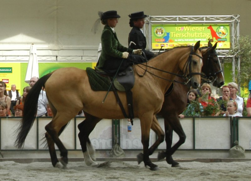 Reitvorführung im Damensitz beim Wiener Tierschutztag auf dem Rathausplatz